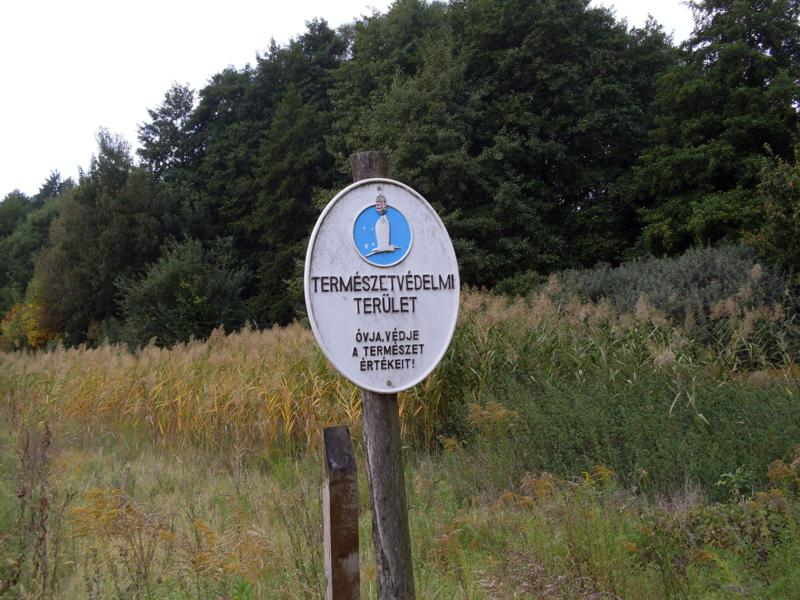 Védett területet jelző tábla (Erdőtelki Égerláp Természetvédelmi Terület, Heves megye)